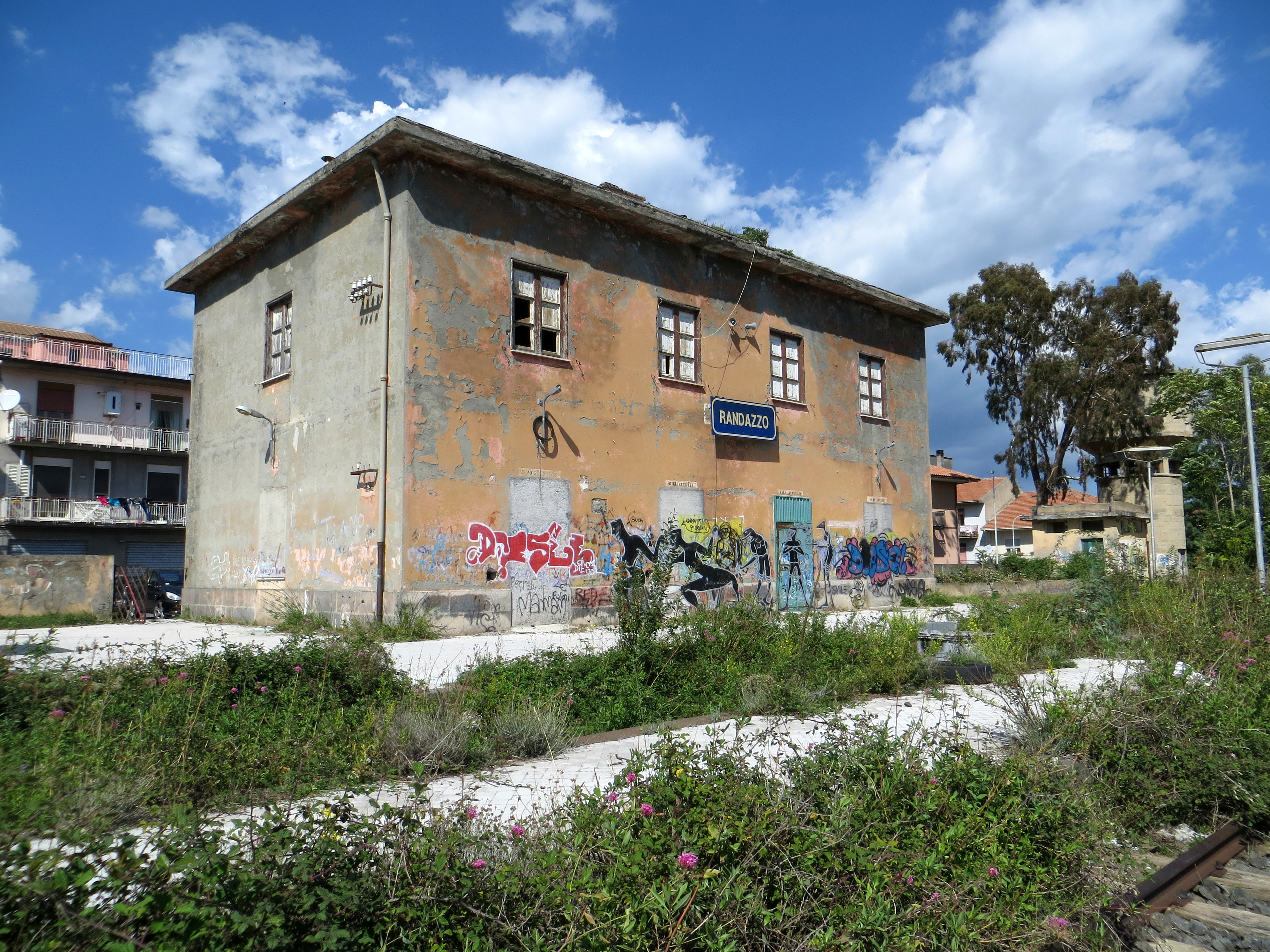 Stazione FS di Randazzo abbandonata.